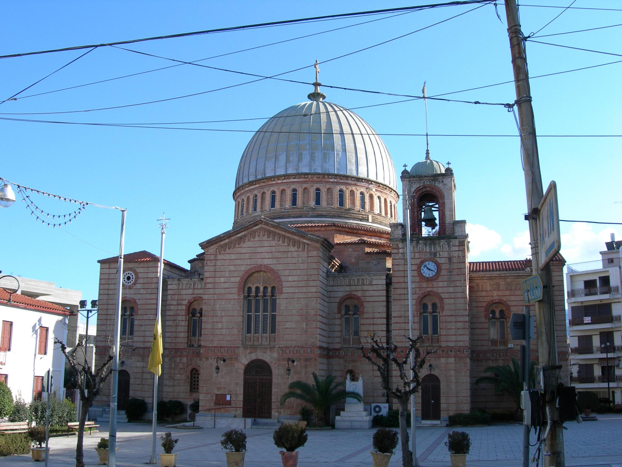 Ο Μητροπολιτικός ναός του Αιγίου Παναγία Φανερωμένη